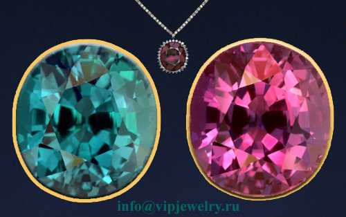 Натуральный александрит